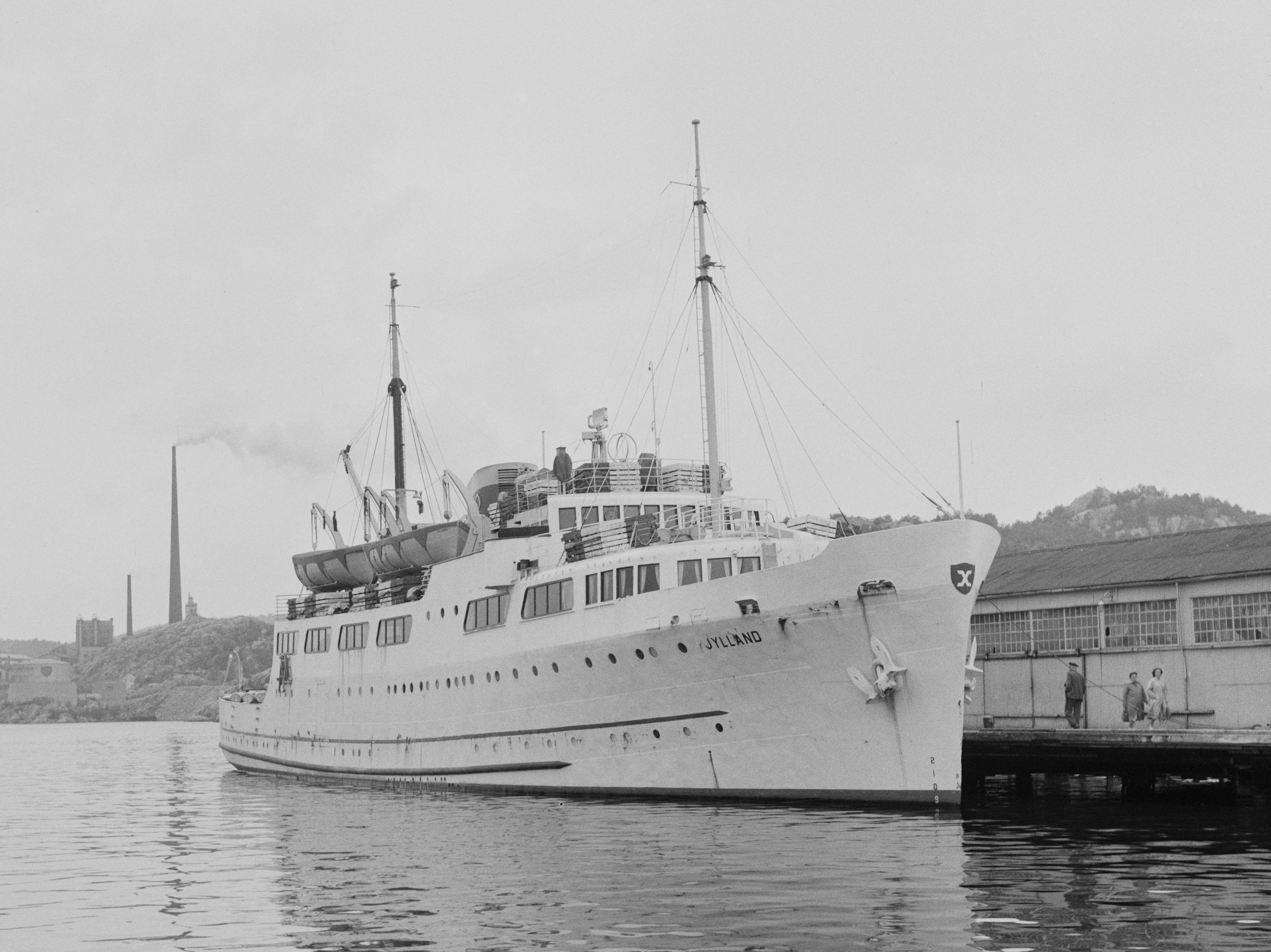 Bildet er hentet fra Arkivverket. Kristiansand havn Arkivinstitusjon : Riksarkivet Arkivnavn : Billedbladet NÅ Sted : Norge, Vest-Agder, Kristiansand, Krikstiansand havn Emneord: Landskap, Brygger Avbildet